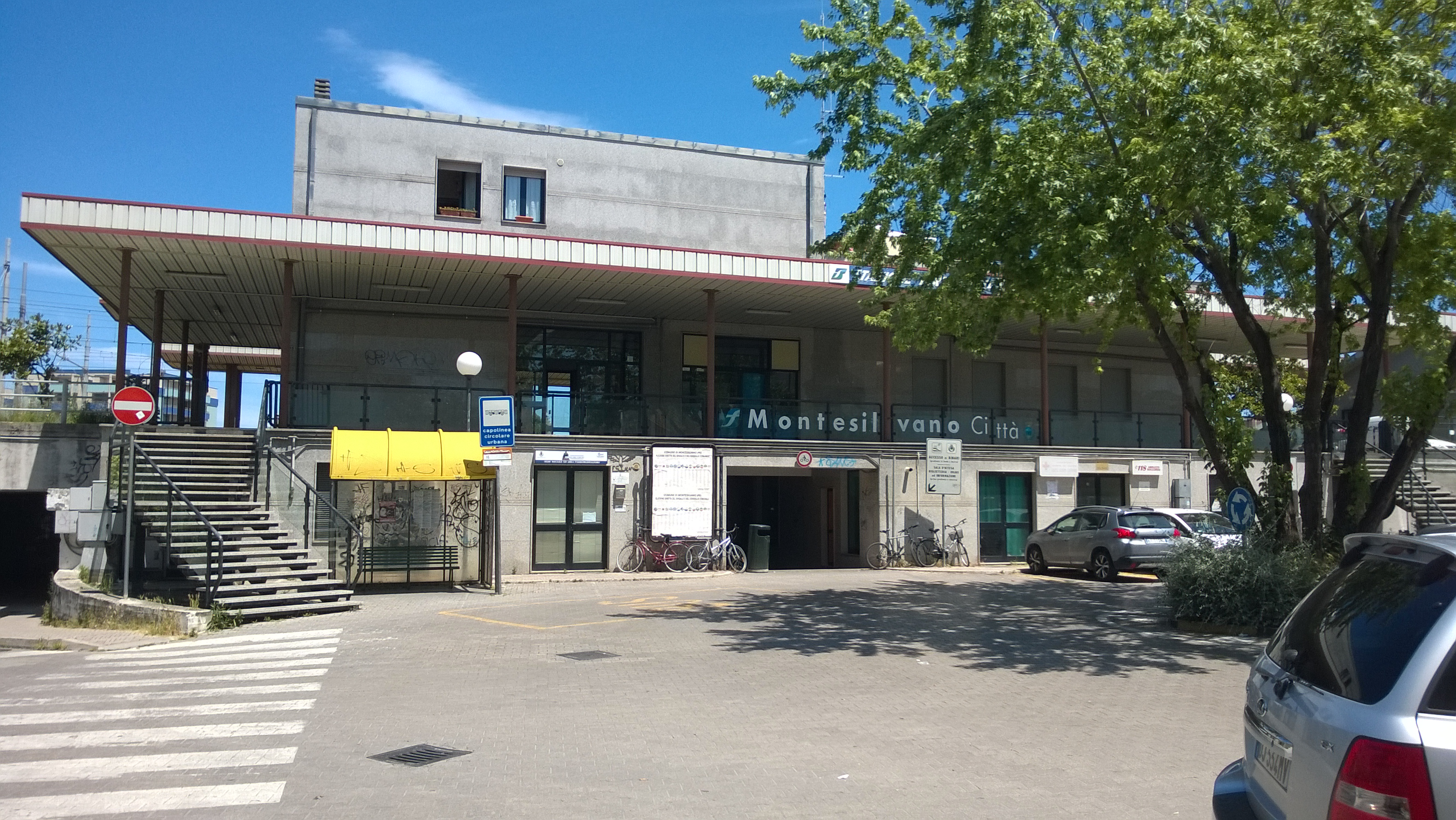 Edificio stazione di Montesilvano